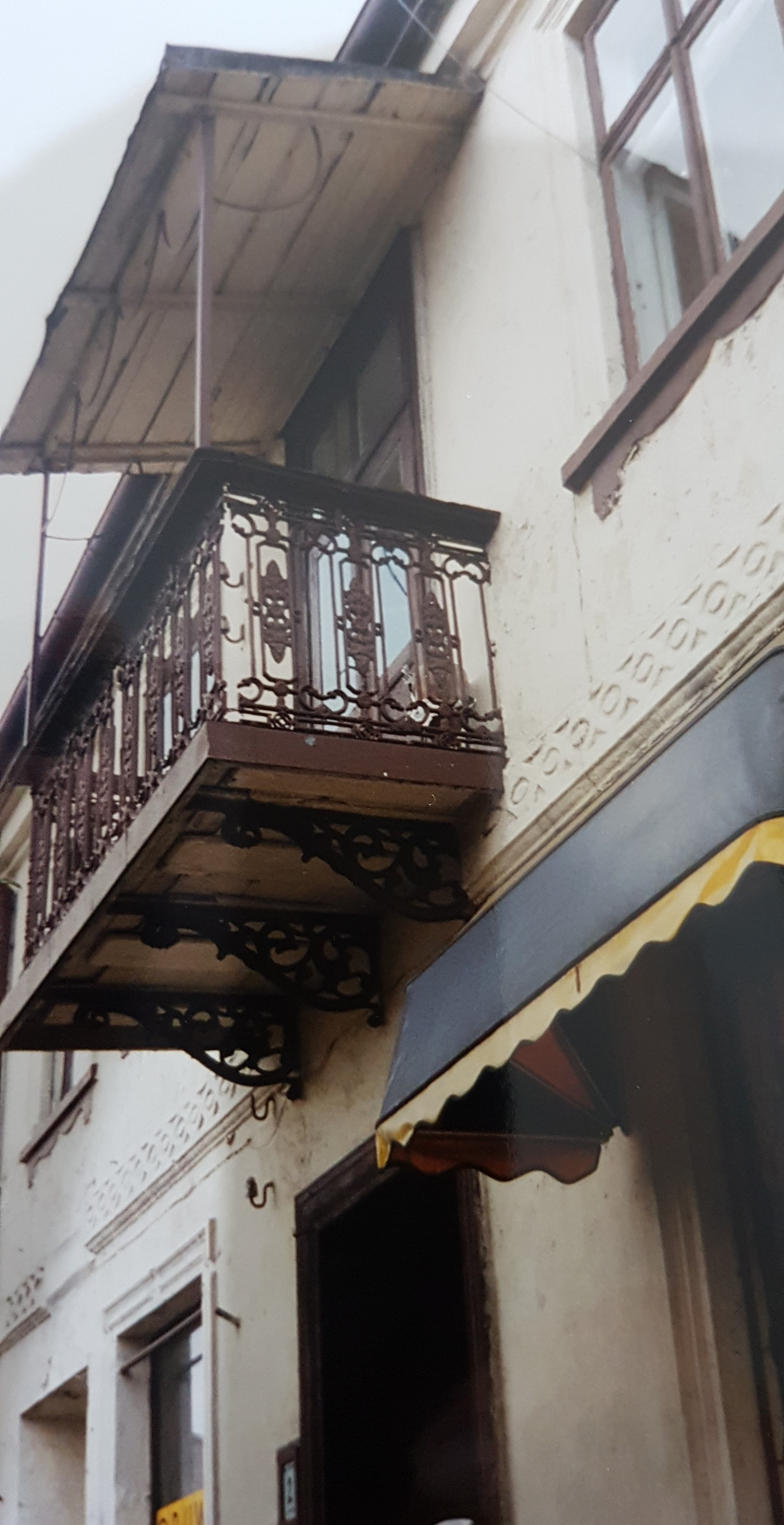 בית משפחת זנדל בלאסק